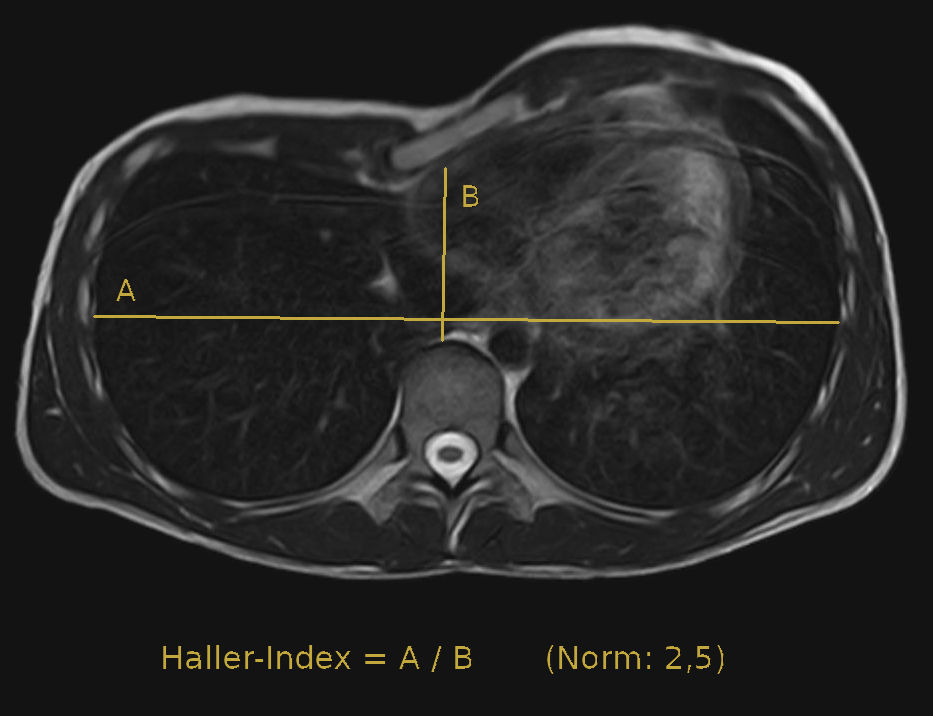 Der Haller-Index zur Quantifizierung einer Trichterbrust (Pectus excavatum) kann auch mit der MRT in axialen Schichten bestimmt werden. Der Normalwert beträgt 2,5. In diesem Beispiel liegt er bei ca. 4,7.